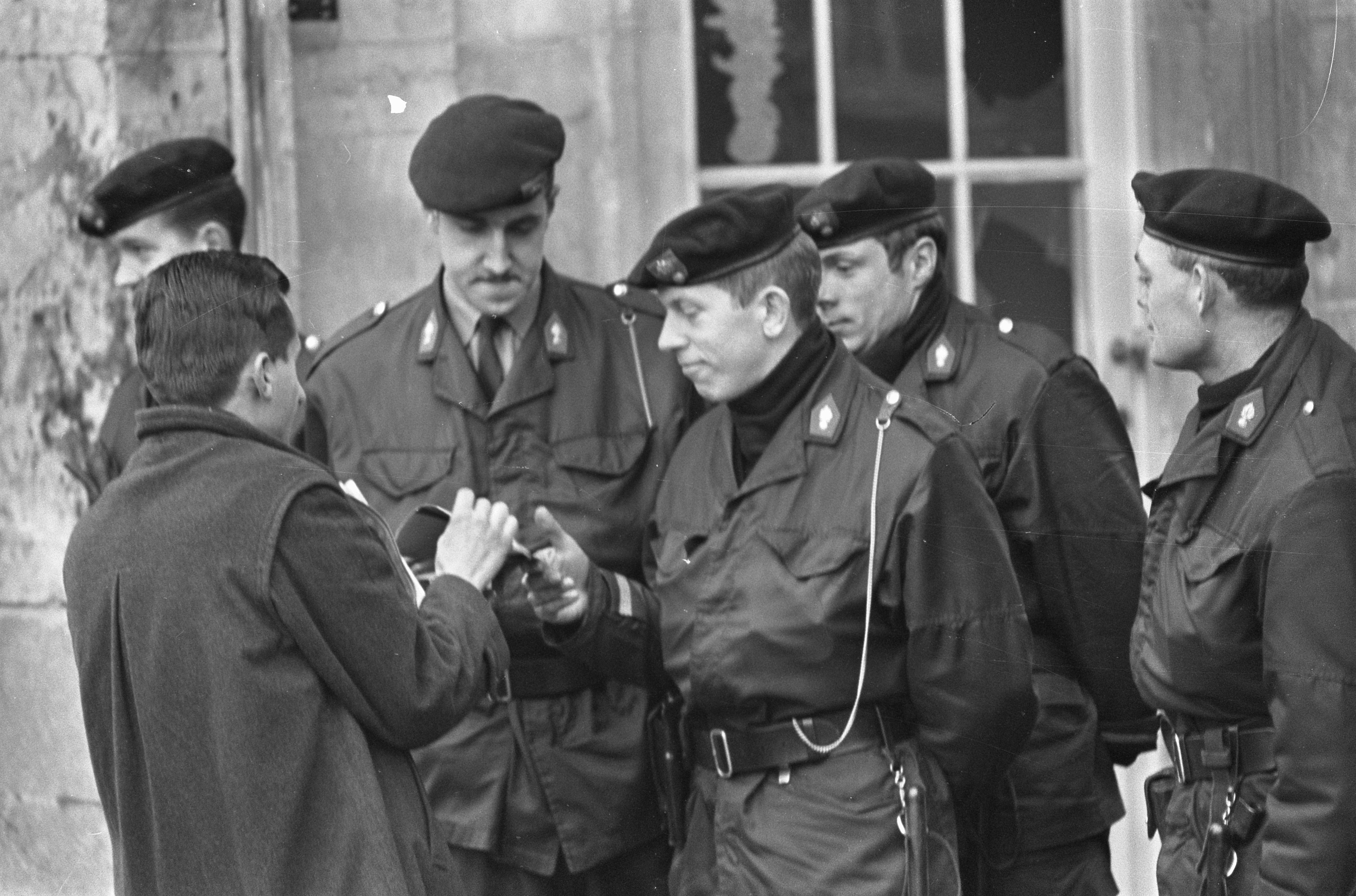 Staking Vlaamse studenten te Leuven, een Waalse student toont zijn kaart en mag de Universiteit binnen